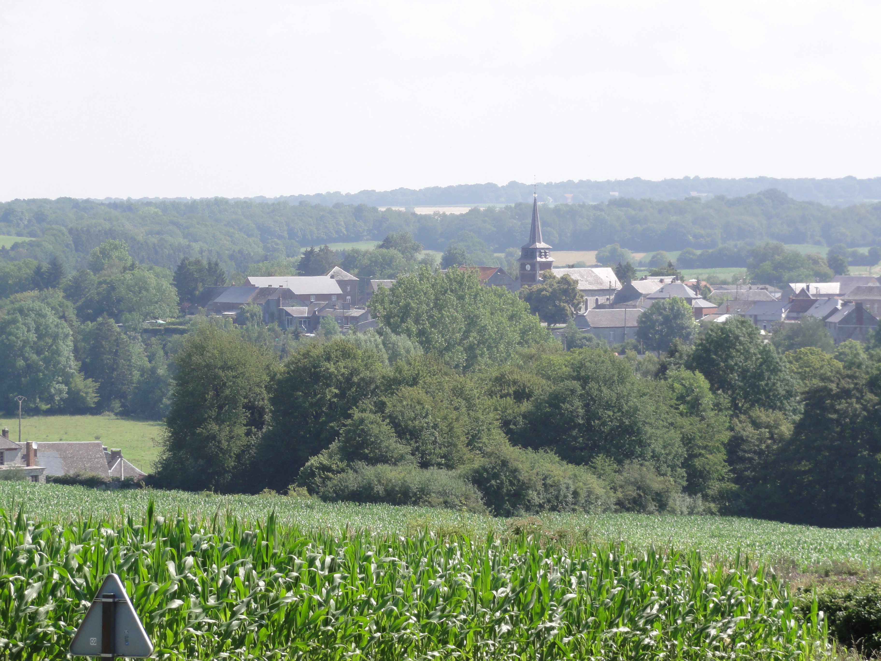 Bousignies-sur-Roc (Nord, Fr) vue du village